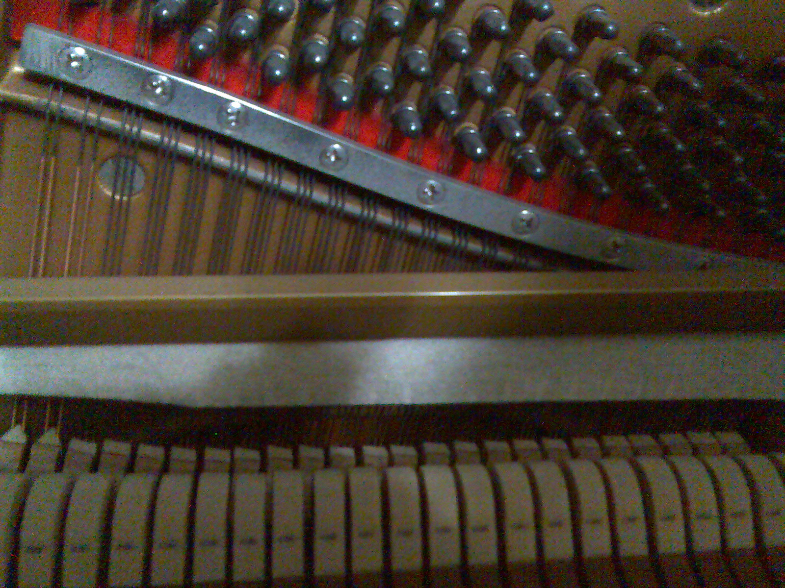 直立鋼琴內部